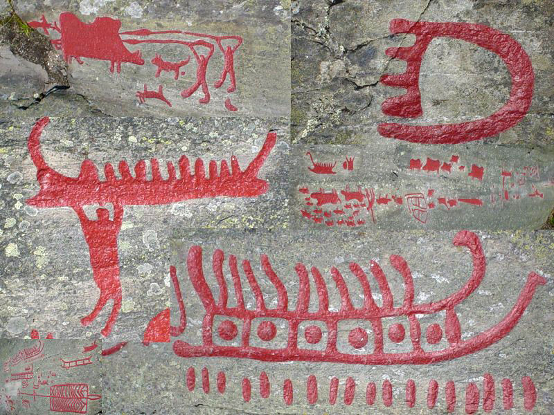 Montage av ristningar från Himmelstalund. Foto Olof Ekström 2004. Överst till vänster vildsvinsjakt. Överst till höger björnspår, ett av en rad spår som löper över en av hällarna. Mitten till vänster möjligen ett s.k. votivskepp, en offergåva. Mittenraden till höger "svinhällen", så kallad efter den stora mängden svinbilder. Nedersta raden till vänster en av hällarna, till höger ett skepp.